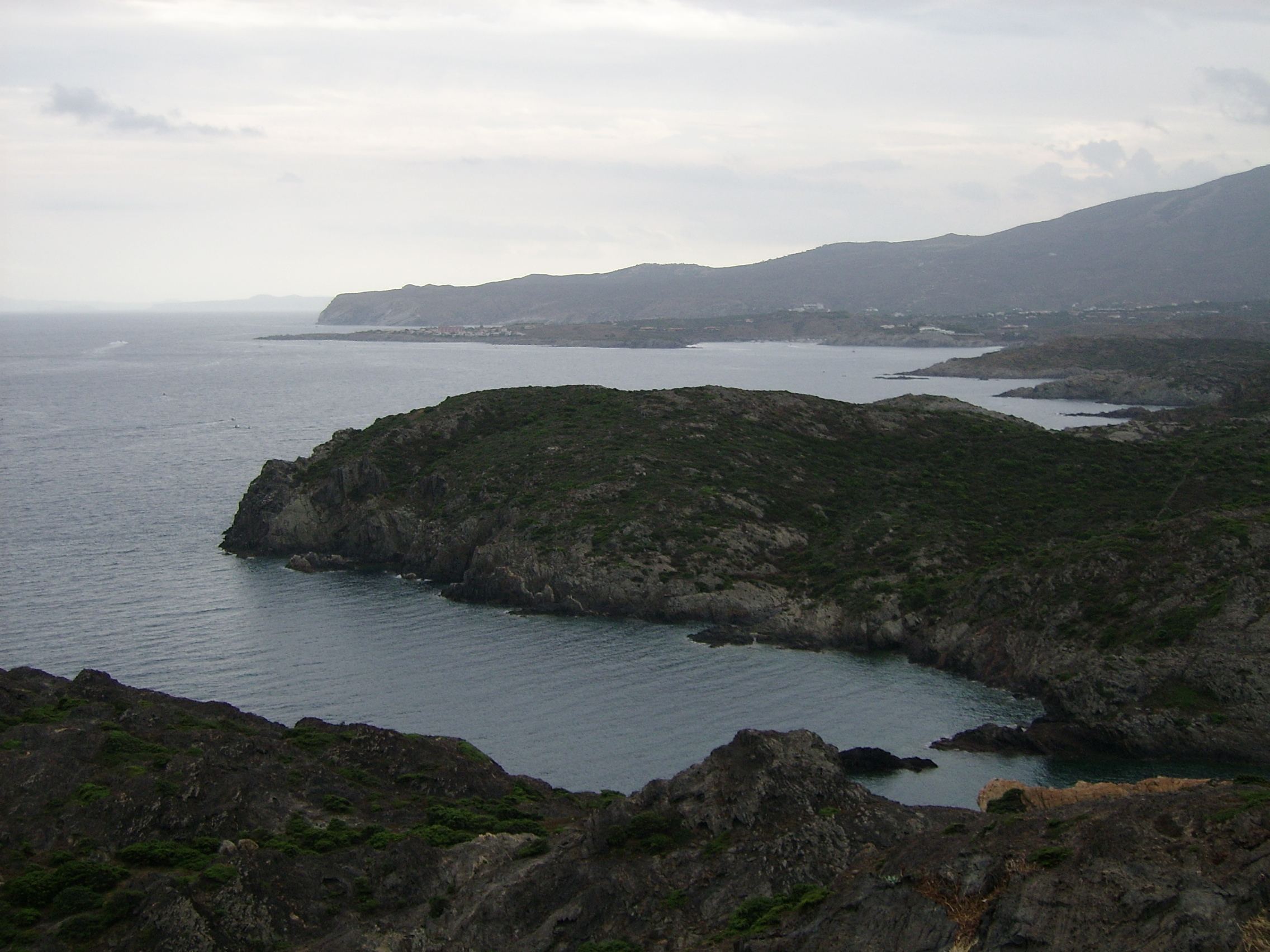 Cap de Creus.